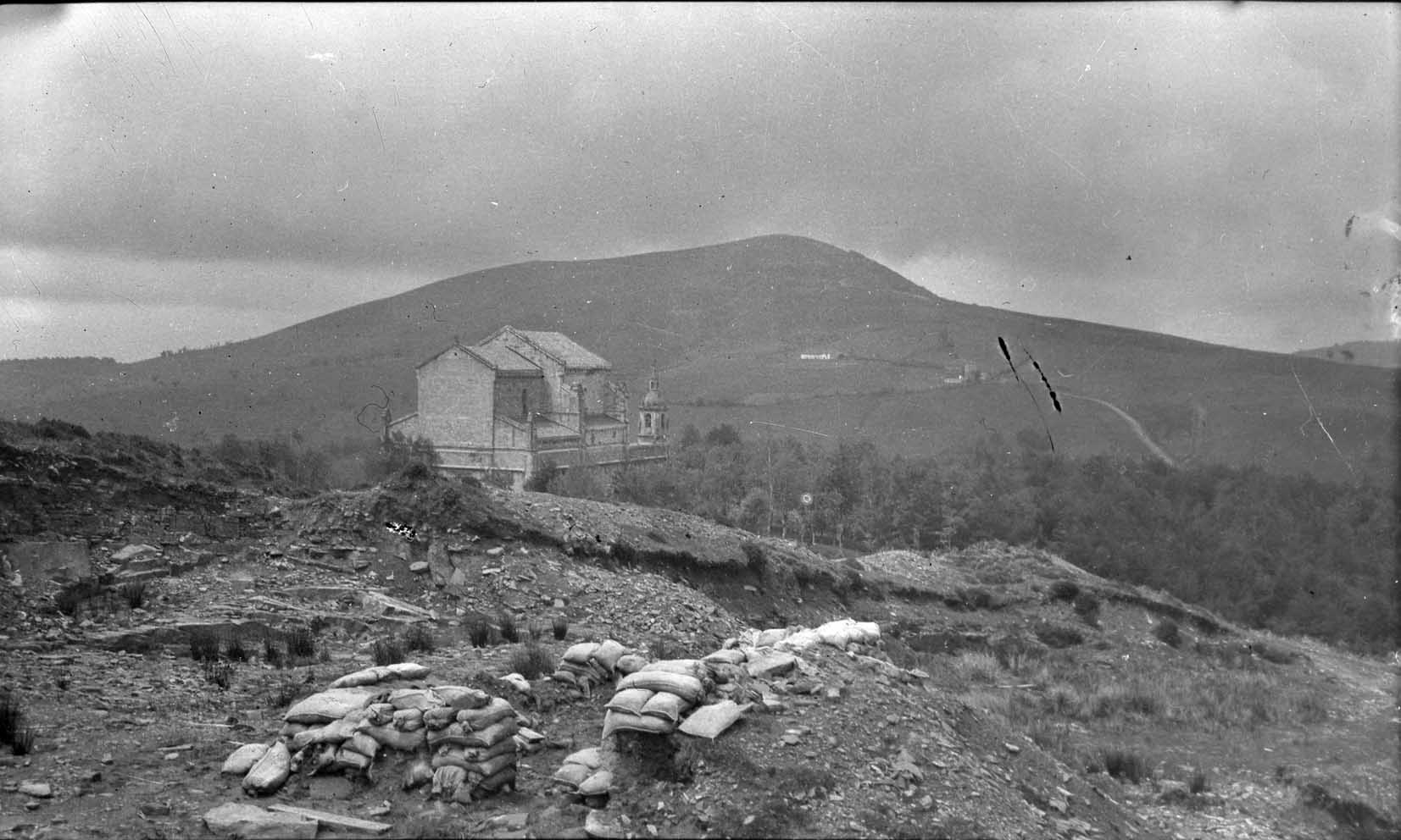 "Urkiola" ALCANCE Y CONTENIDO: Urkiola desde las trincheras de Saibi NOTAS: En el positivo, en el reverso, manuscrito, de mano del autor "Urkiola. Año 1937", y con sello estampado "OJANGUREN. EIBAR" VOLUMEN Y SOPORTE: 1 fotografía en blanco y negro, negativo en película, positivo en papel